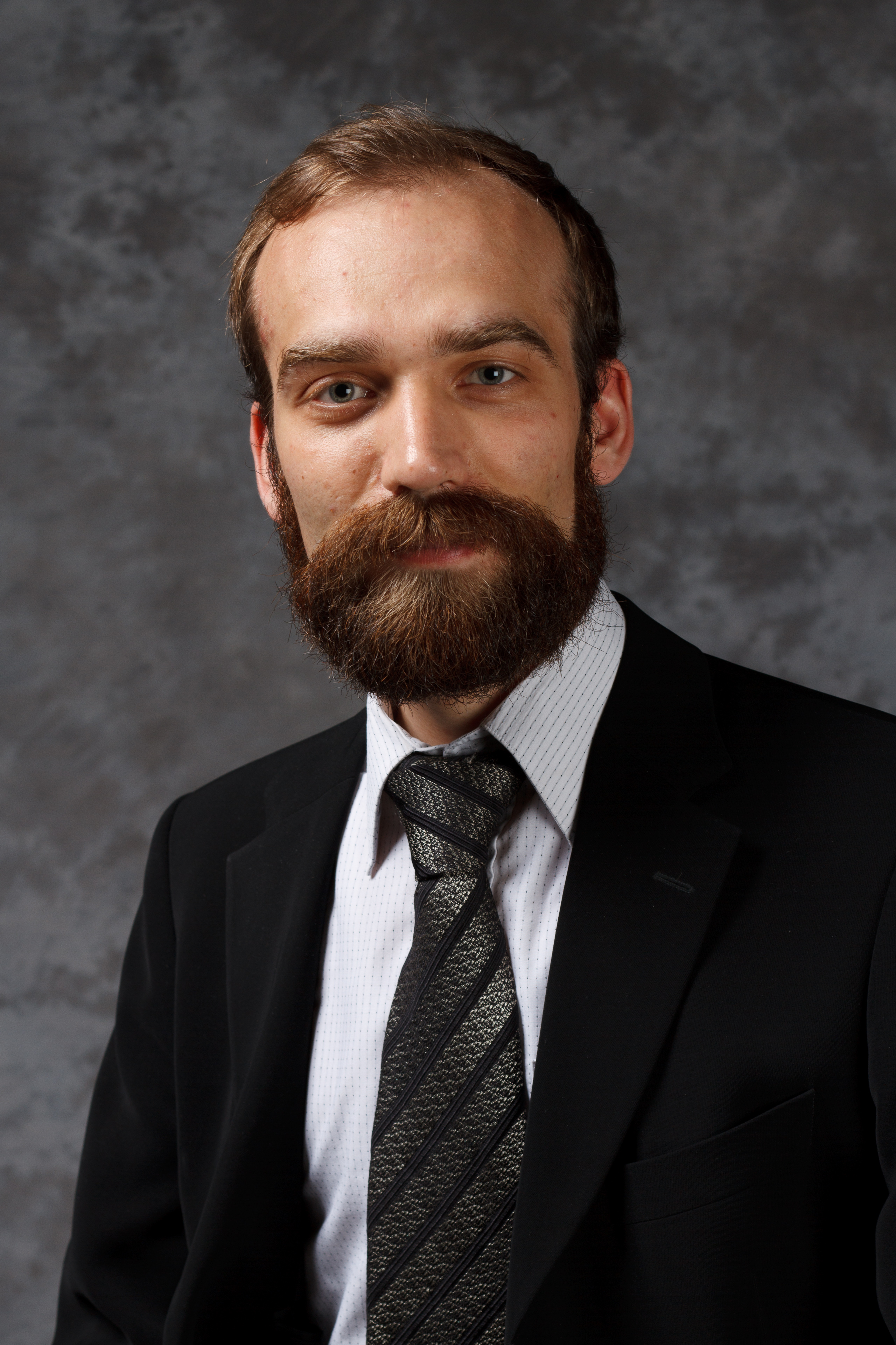 Harri Kivistö, Piraattipuolueen puheenjohtaja (2012– )